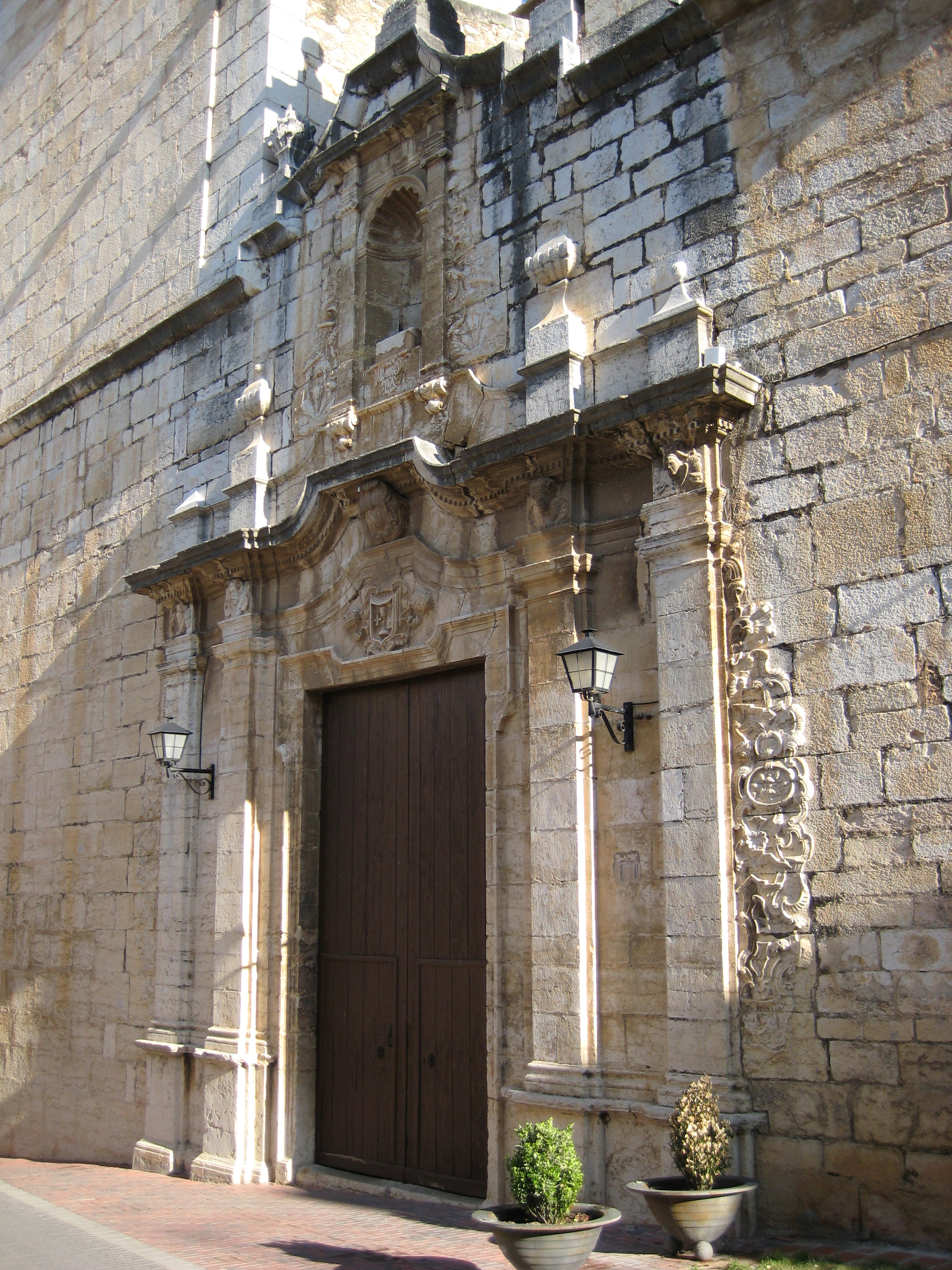 Portada de l'església de Sant Llorenç de Càlig (Baix Maestrat)